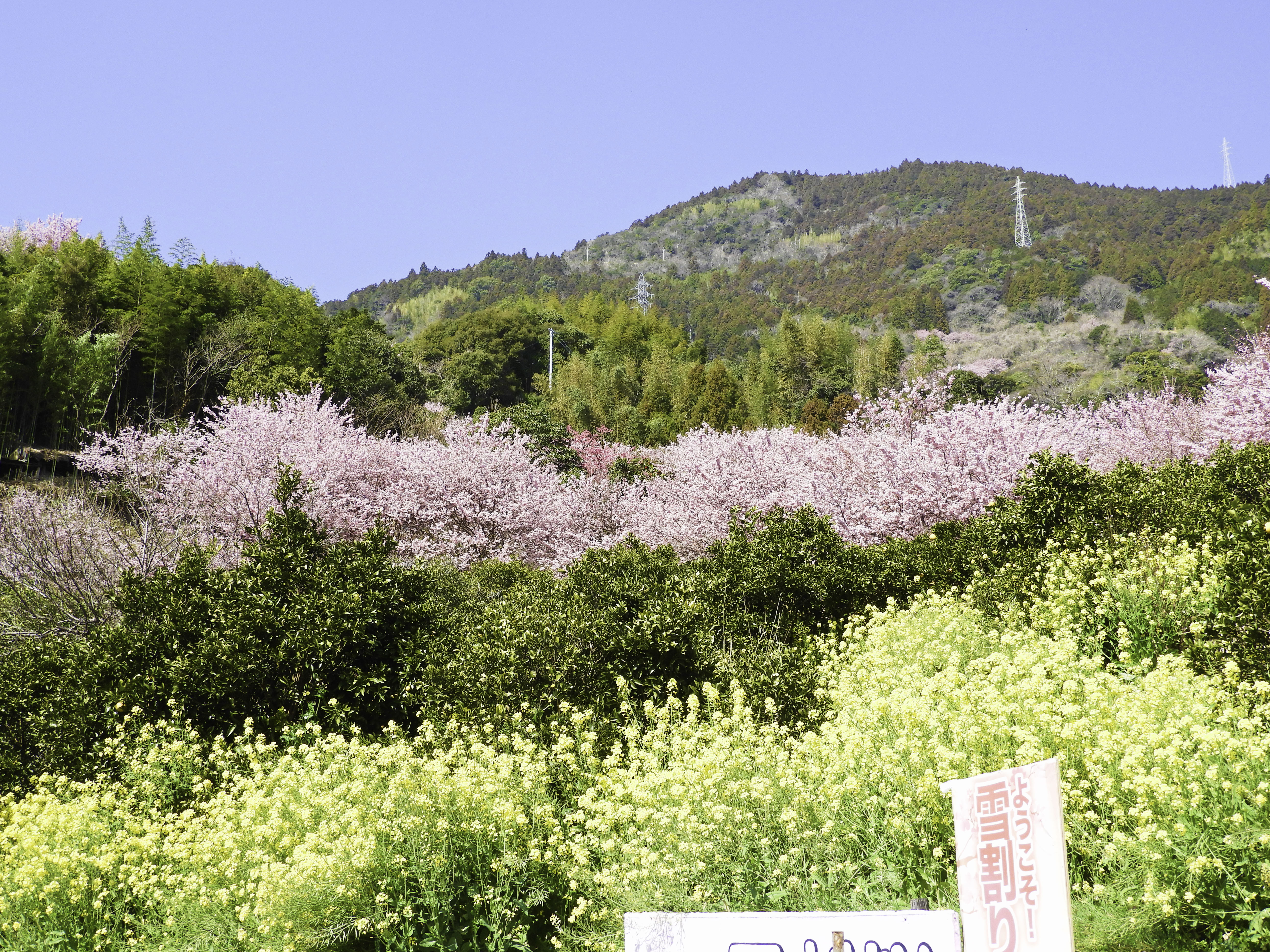 桑田山に約1,000本の雪割り桜が植えられていて、2月中旬から3月初旬までが見ごろ。